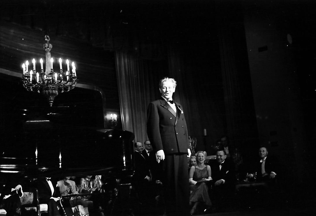 Kabarett der Komiker: Paul Hörbiger